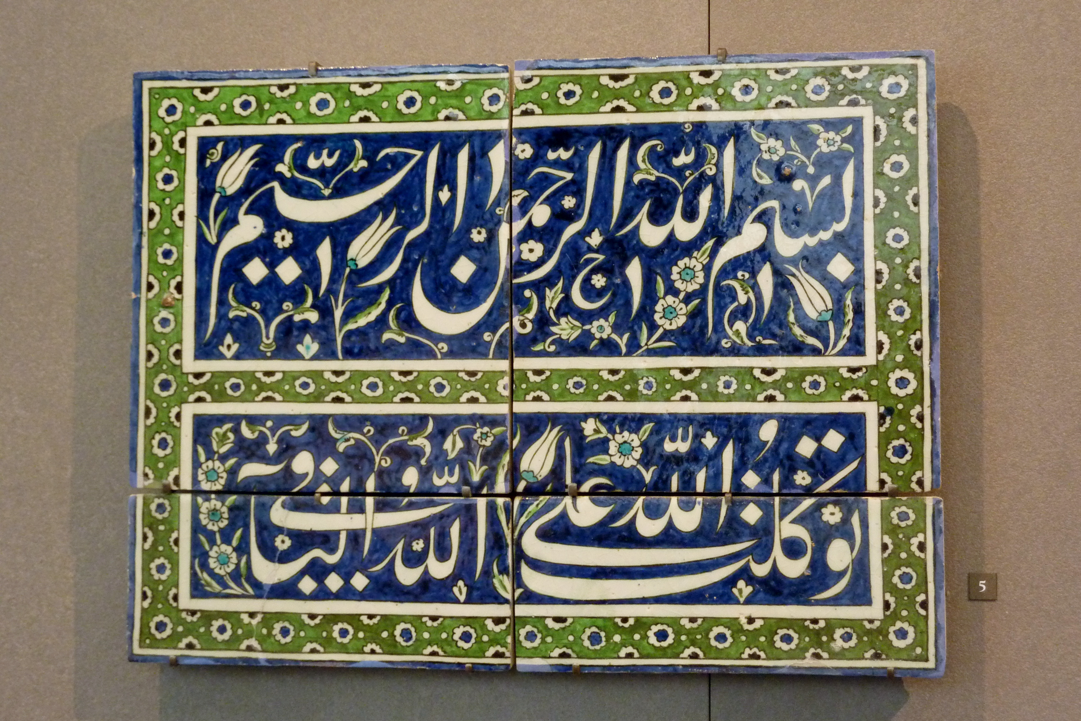 Keramikfliese in der Abteilung Islamischer Kunst im Louvre in Paris; mit arabischer Inschrift